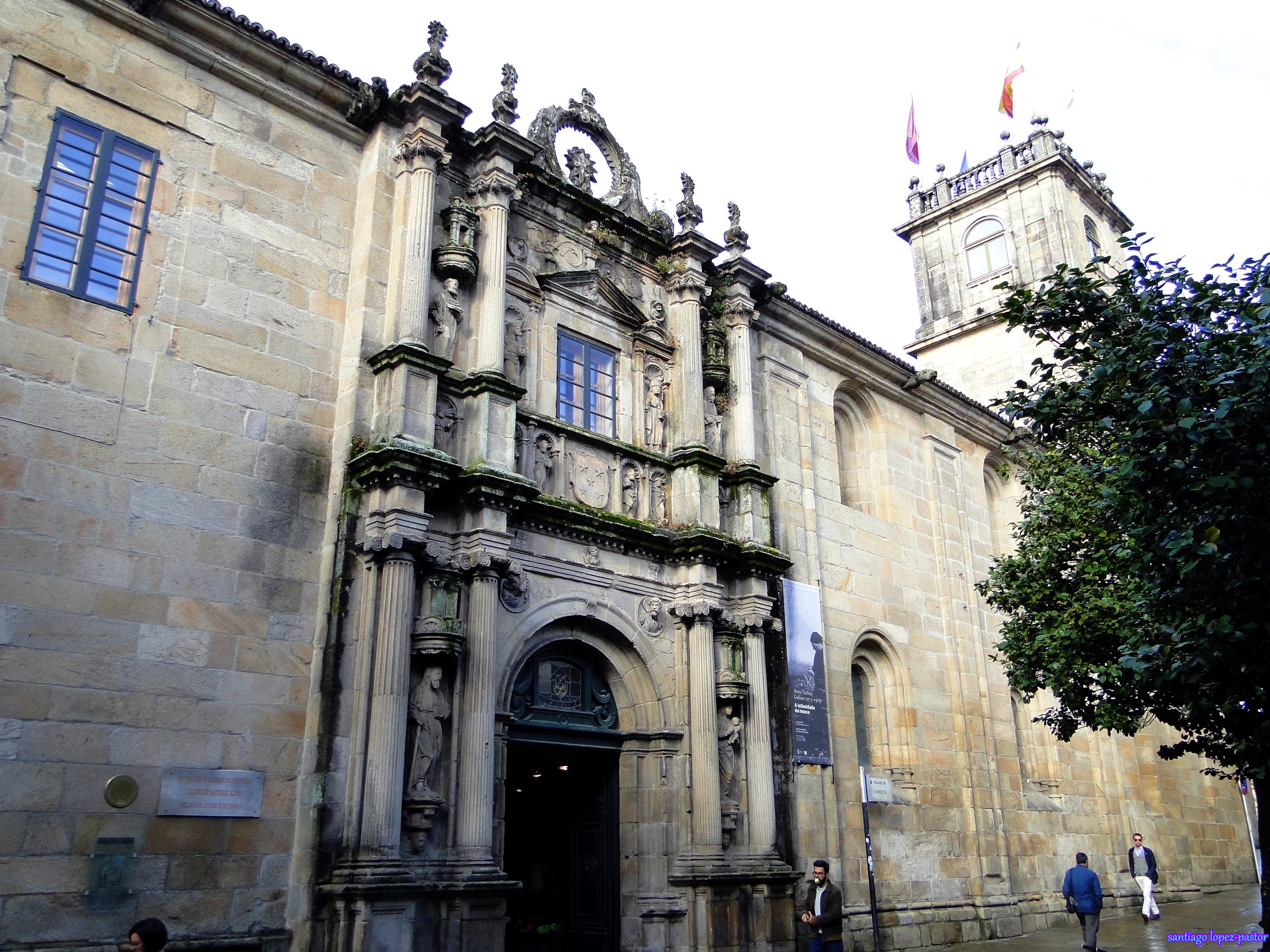 Colegio Fonseca.